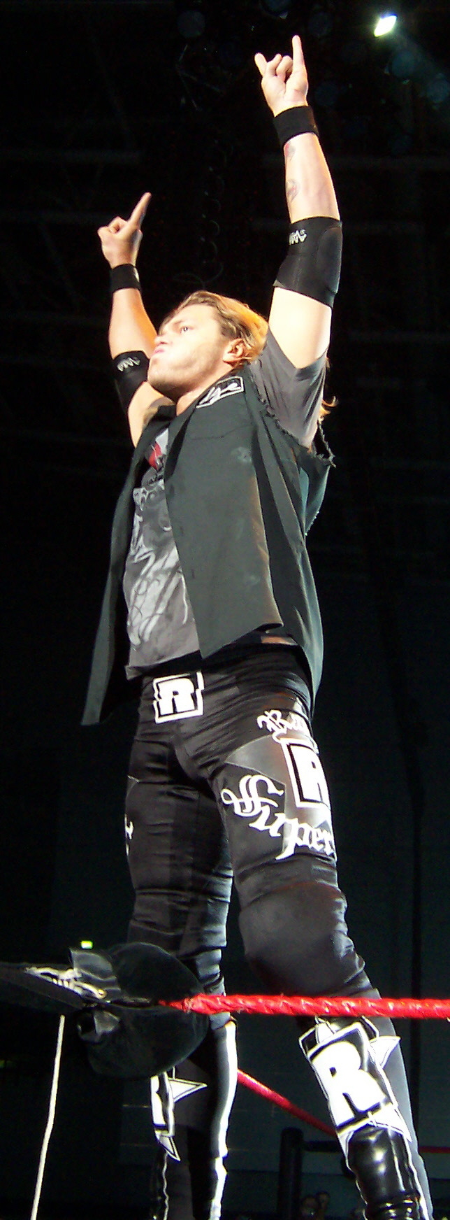 Adam "Edge" Copeland 2007 in Bremen